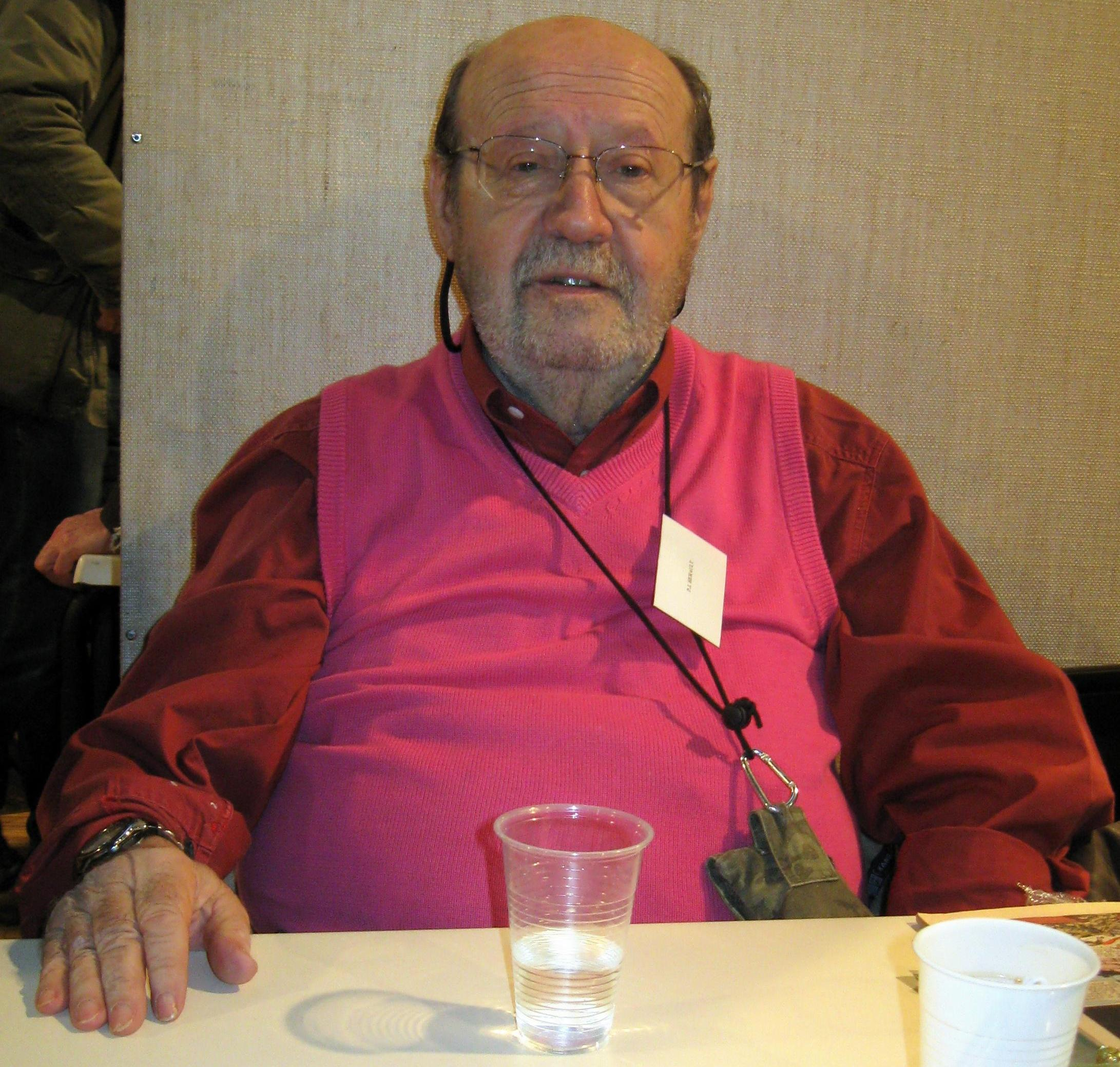 Paul-Jean Hérault, dec. 2010, 7emes rencontres de l'imaginaire, Sevres, 92, France